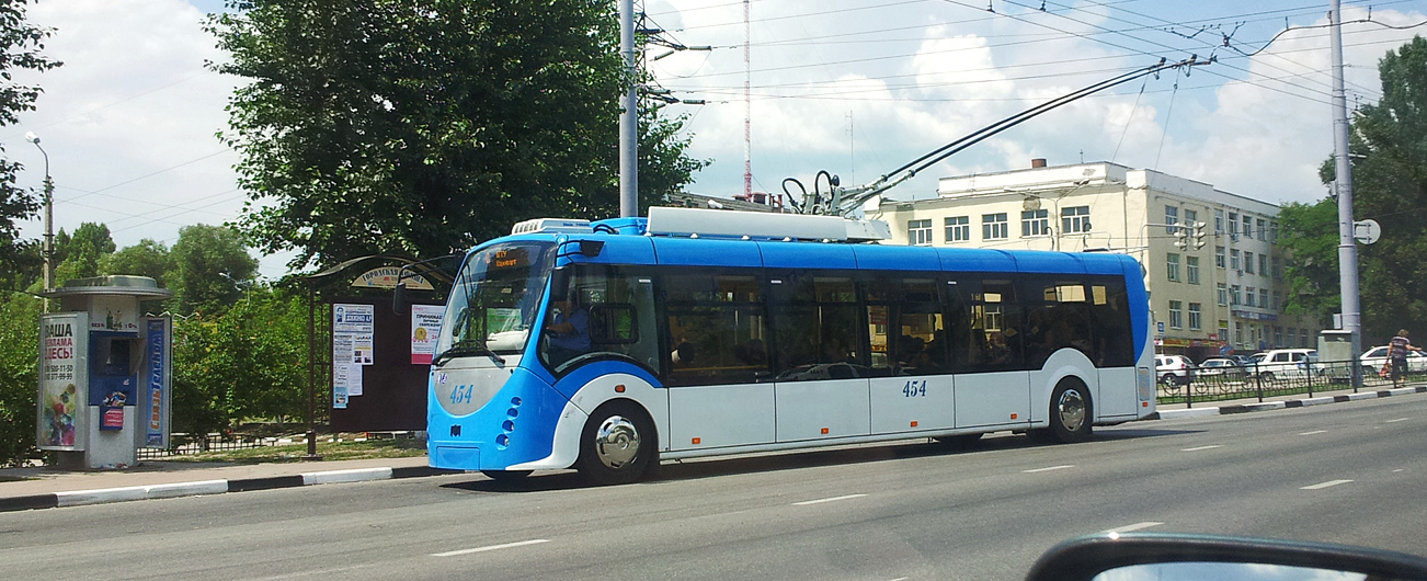 Троллейбус Витовт в Белгороде